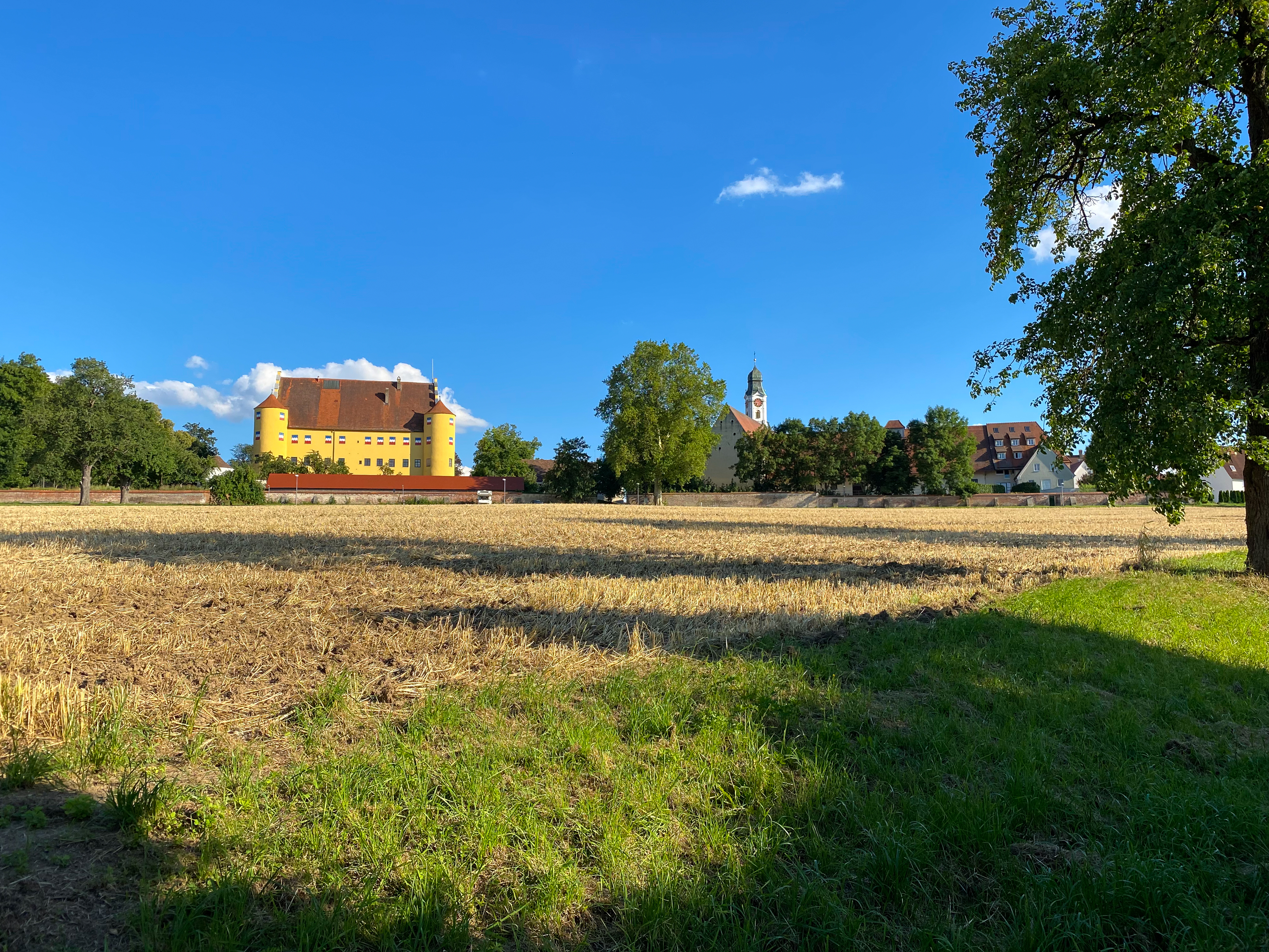 Schloss Erbach und Pfarrkirche St. Martin